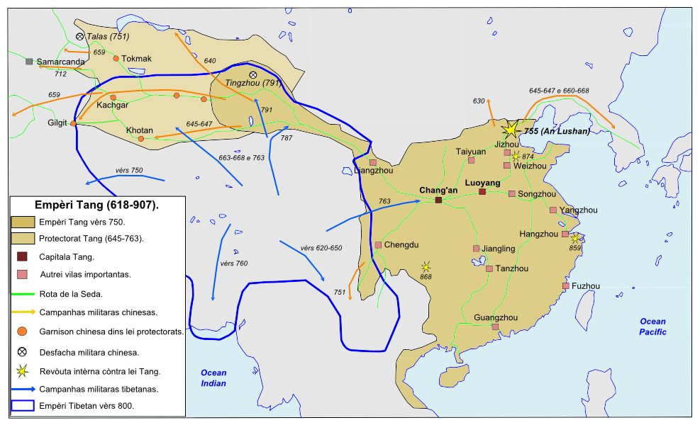 Empèri Tang (618-907).